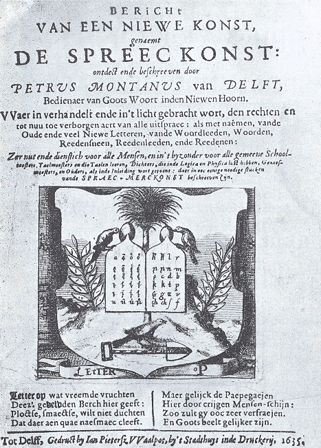 Innenseite eines Buches von 1635